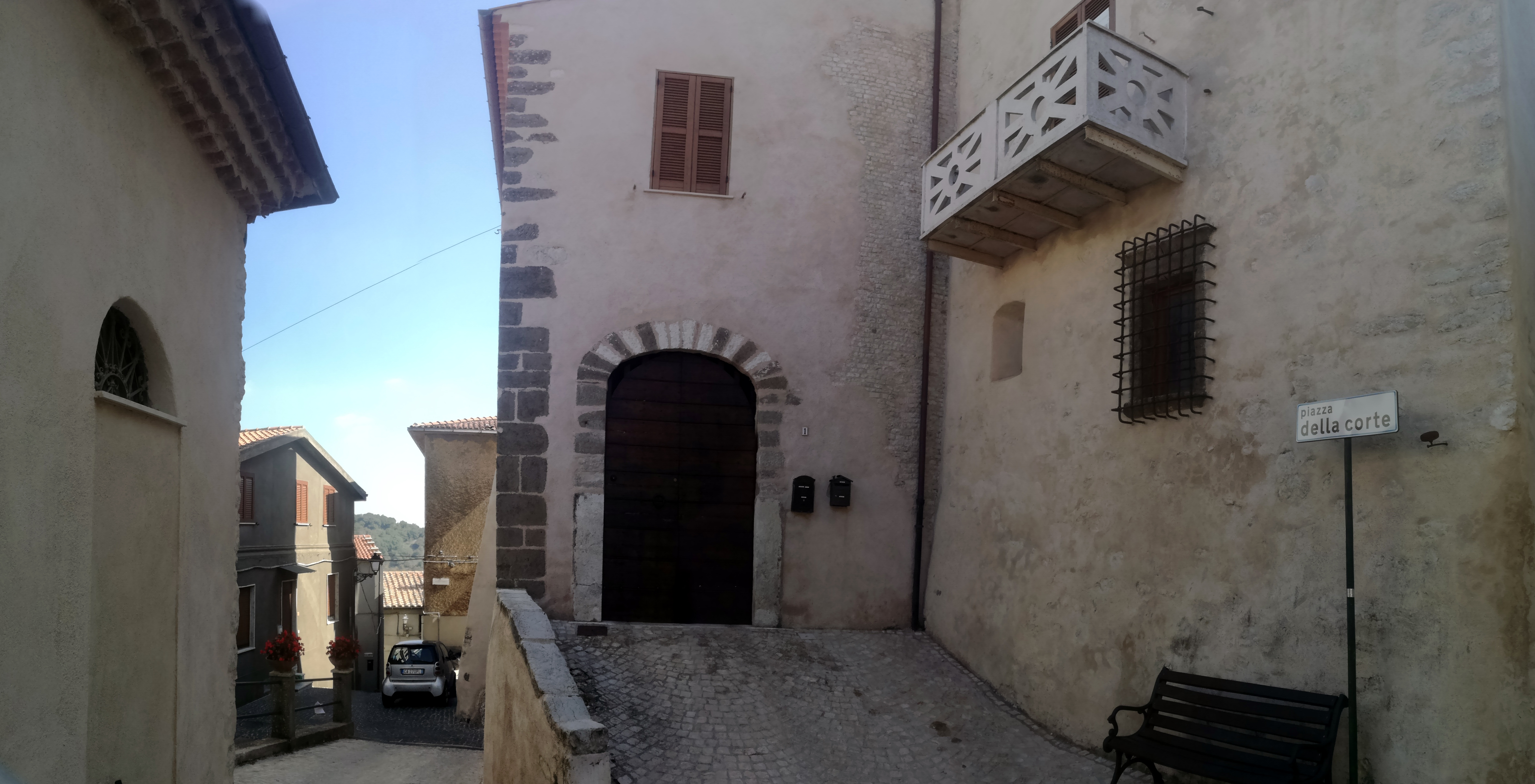 Palazzo del principe (noto in loco anche come "castello"), comune di Rocca Massima